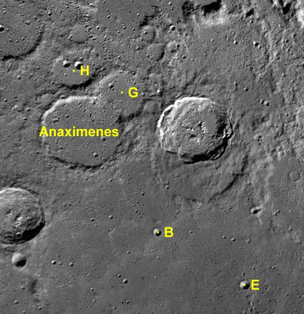 Cráter lunar Anaximenes. Cráteres satélite. (Imagen LRO)